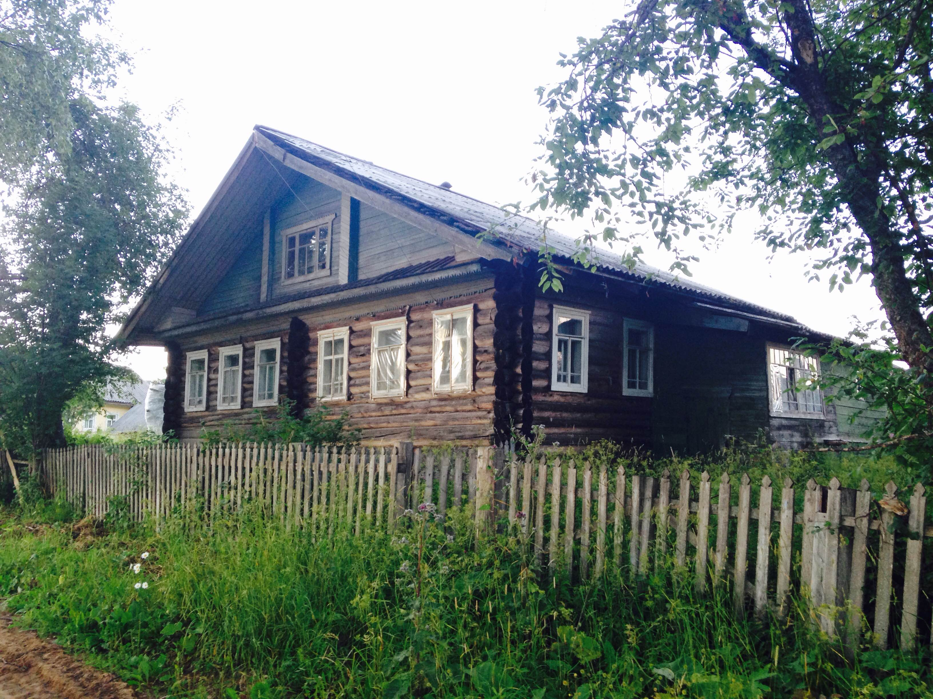 Скучающий дом по своим хозяевам